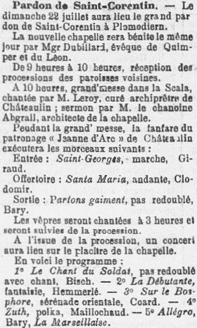 Le programme du pardon inaugural de la nouvelle chapelle Saint-Corentin à Plomodiern (dimanche 22 juillet 1900)